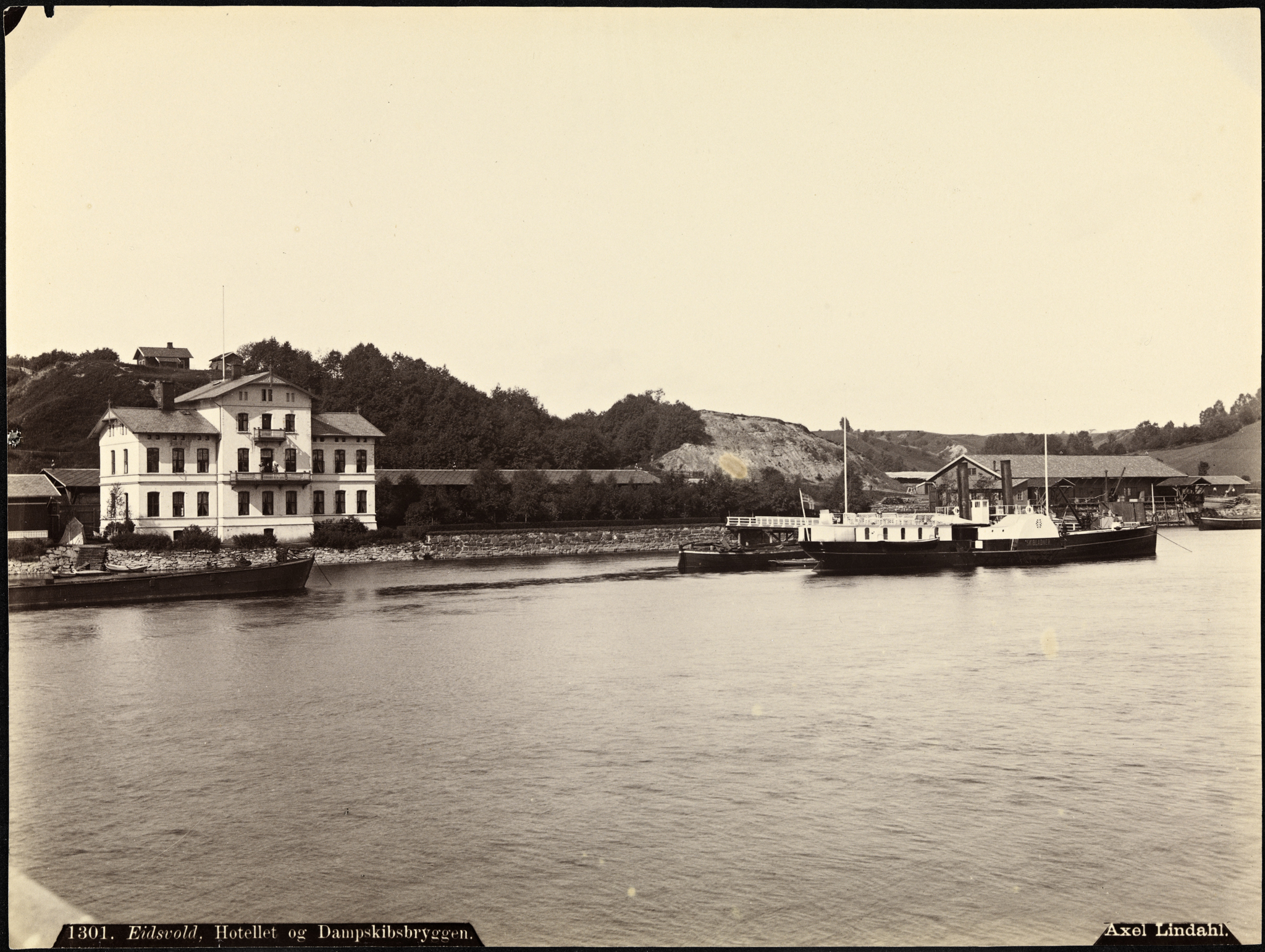 Tittel / Title: . Eidsvold. Hotellet og Dampskibsbryggen Dato / Date: 1880-1890 Fotograf / Photographer: Axel Lindahl (1841-1906) Sted / Place: Akershus, Eidsvoll Eier / Owner Institution: Nasjonalbiblioteket / National Library of Norway Lenke / Link: Bildesignatur / Image Number: bldsa_AL1301